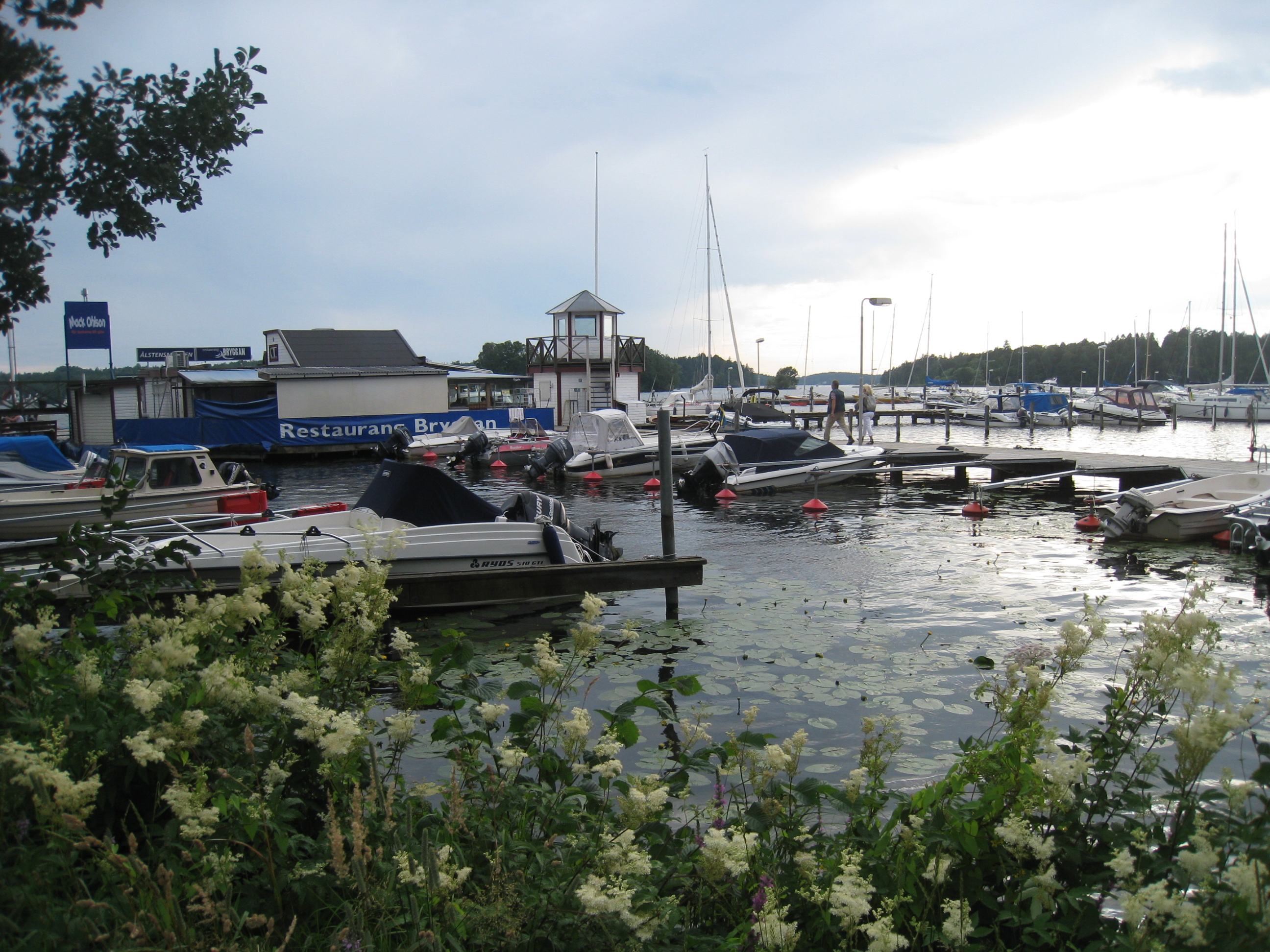 Ålstensparkens natur vid Mälaren i stadsdelen Ålsten i södra Bromma väster om Stockholm.